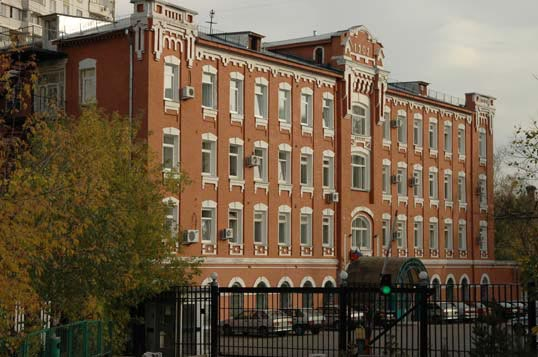 Москва, Витебская улица, дом 7. Бывшее фабричное здание.